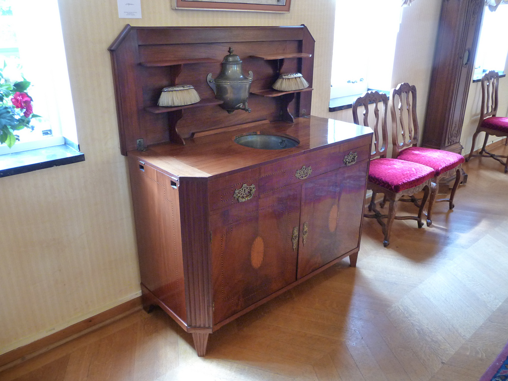 Luikse kamer Museum aan het Vrijthof